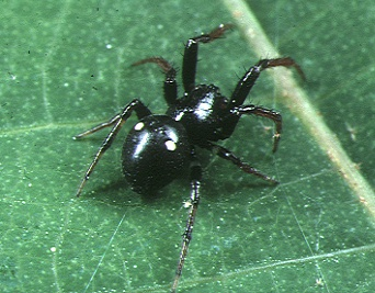 male Cyclosa mulmeinensis from Okinawa.